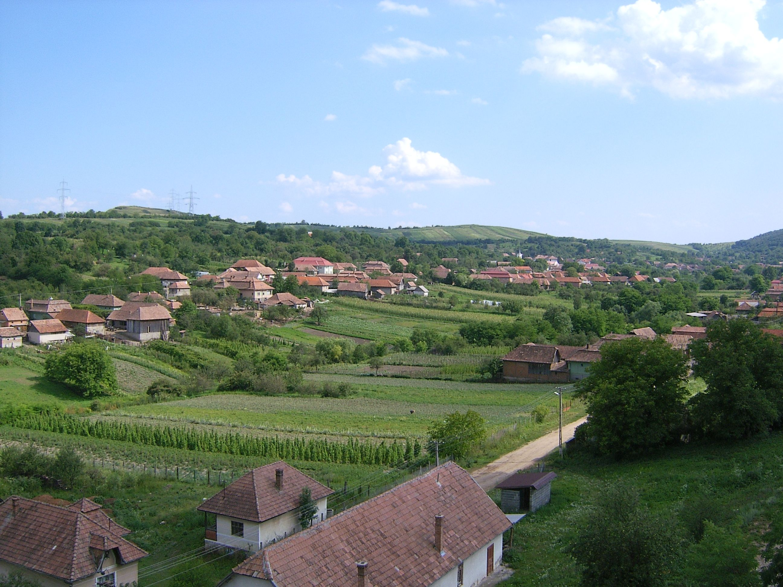 Bágyon, Kolozs megye, Erdély